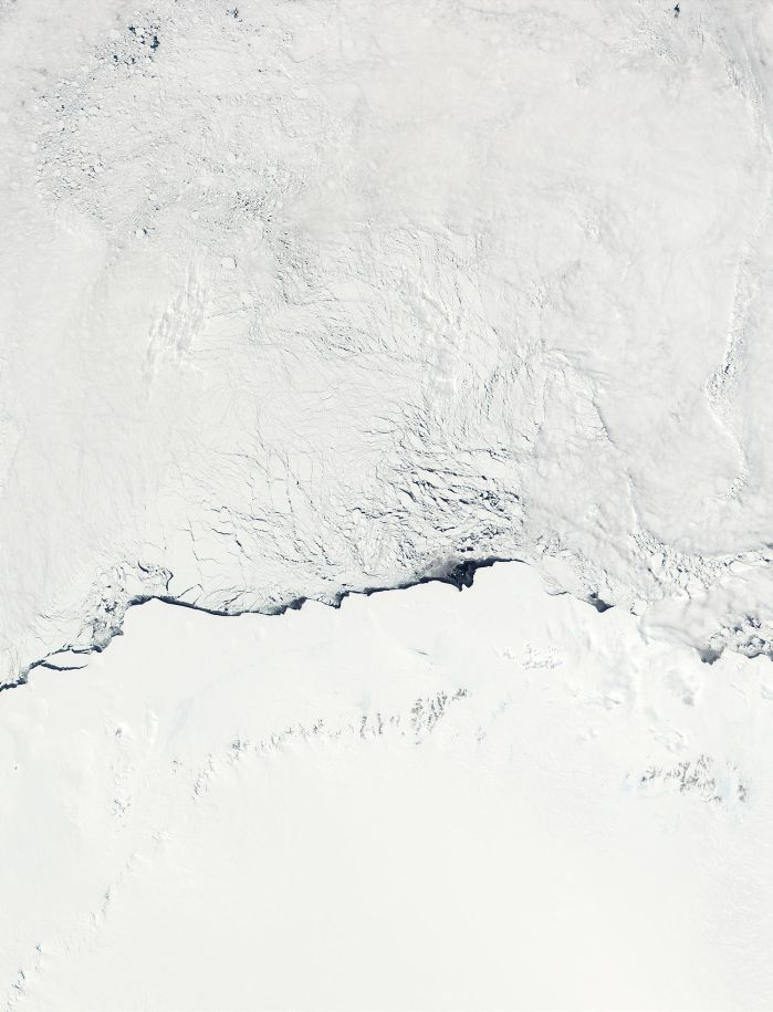 Küste Neuschwabenland, Quelle: , Lizenz: Public Domain